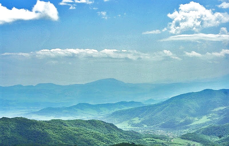 Вид на Качахакаберд